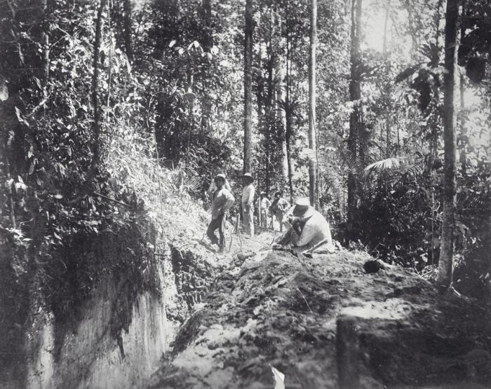 Foto. Het zoeken naar goudhoudende kwartsriffen op "Ulrich's Rif" op het terrein van de goudmijn "Placer L. & F. de Jong"